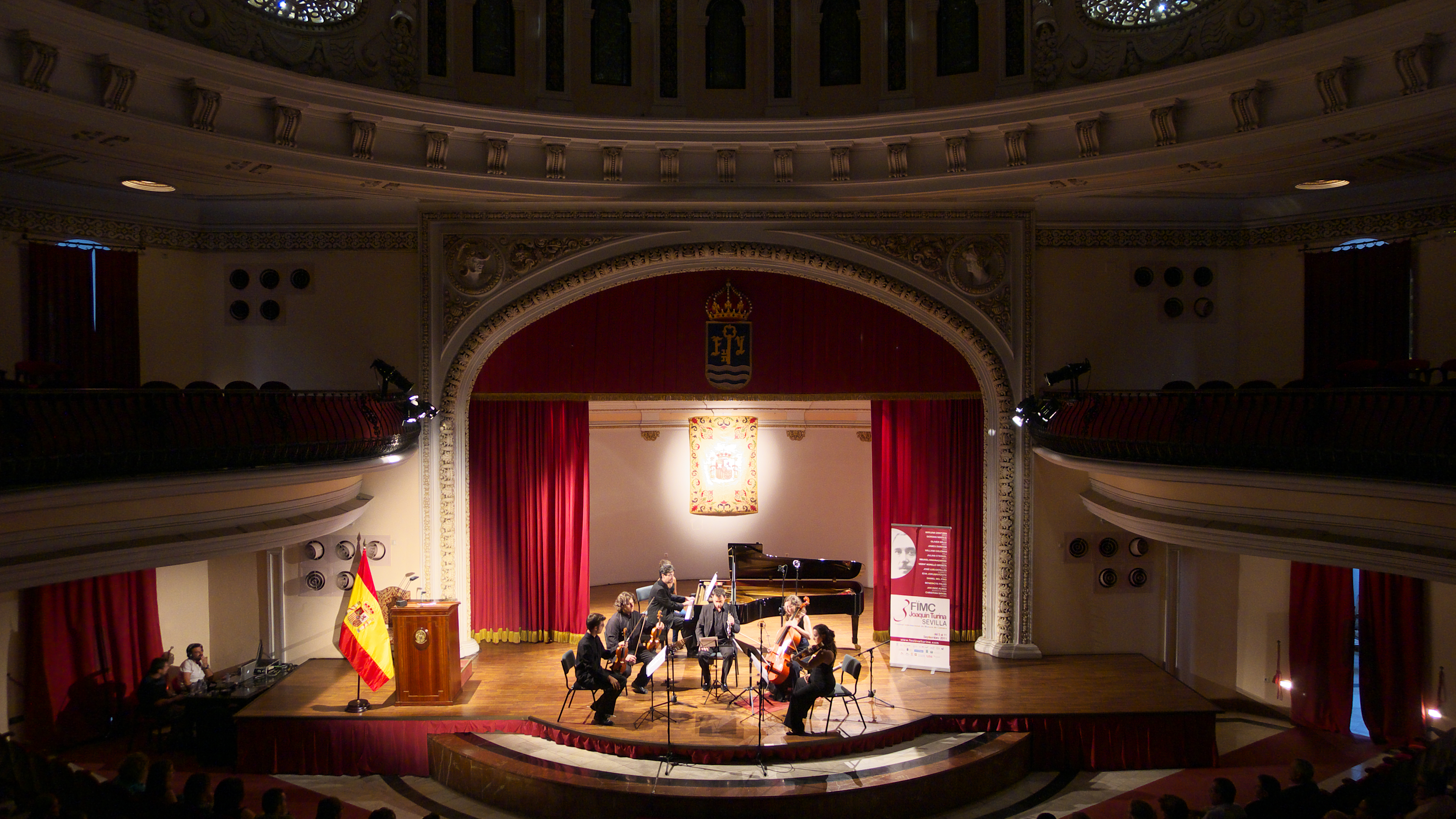 Concierto del clarinete de José Luis Estellés, piano de Daniel del Pino, y el cuarteto Murillo de Sevilla.